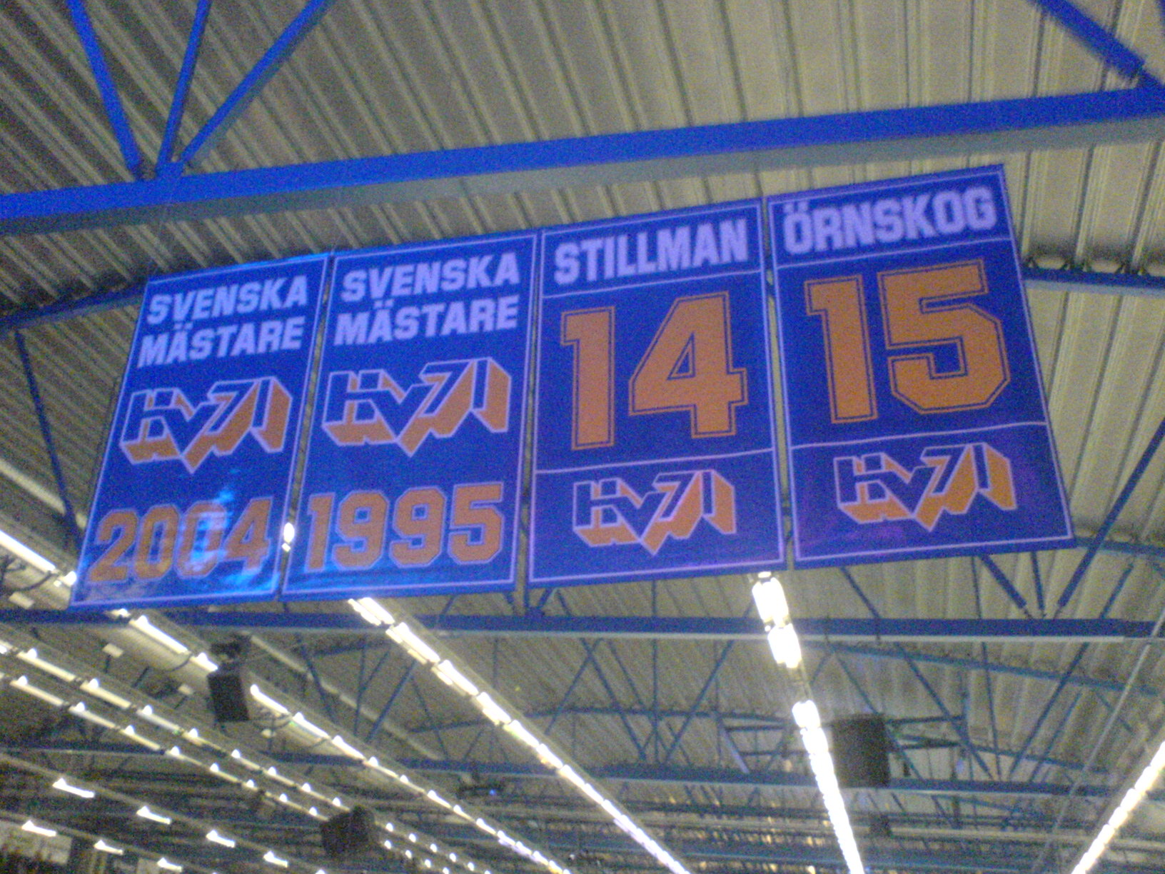 Tröjor i taket från HV71.